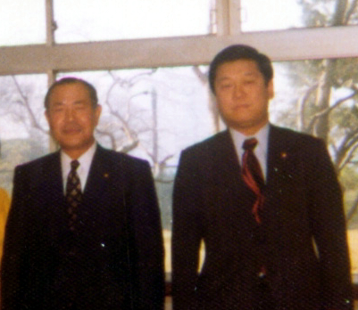 Stanford R. Ovshinsky and Momoko Itō met Kakuei Tanaka and Ichirō Ozawa.